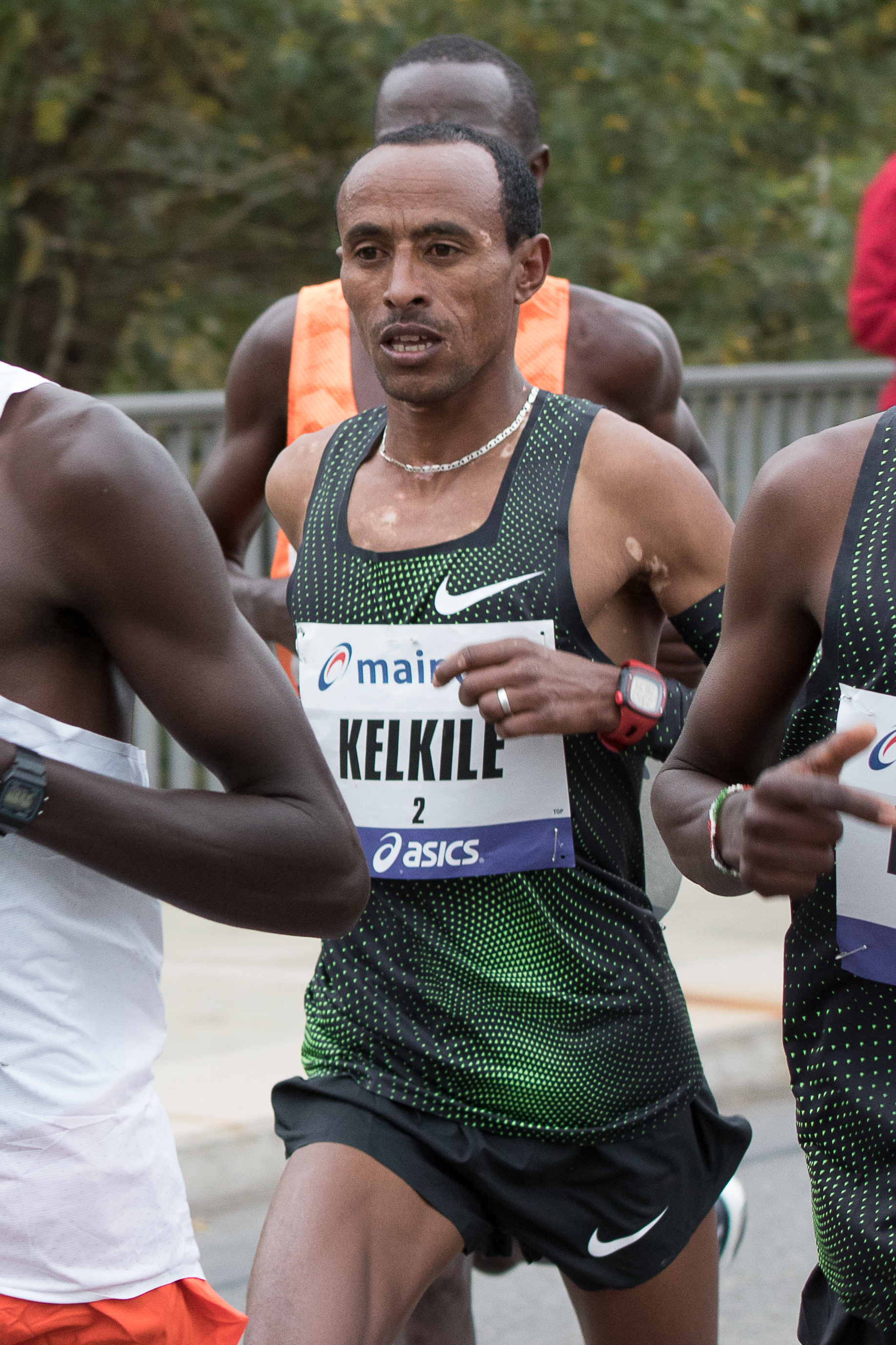 Frankfurt Marathon 2018, October 28. Kelkile Gezahegn Woldaregay